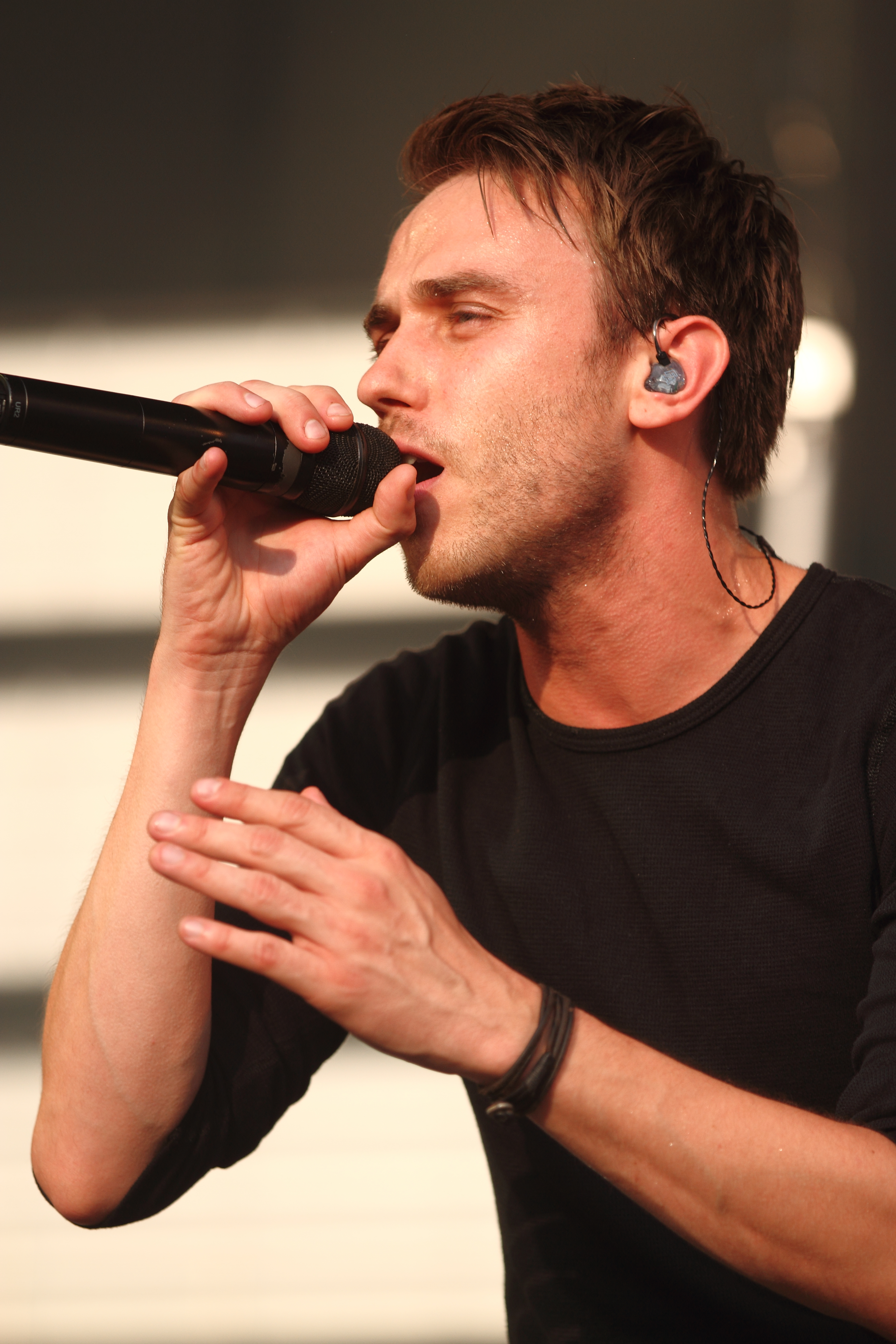 Clueso auf dem ENERGY IN THE PARK Festival 2014 Festivalsommer This photo was created with the support of donations to Wikimedia Österreich and Wikimedia Deutschland in the context of the CPB project "Festival Summer". For taking this photo and licensing it under a free licence a (press) accreditation was required. The photographer had a valid accreditation and has sent it to the email response team, it has been archived in the OTRS system. Users with OTRS account can access it here. Please be aware that (press) accreditations are a permission to generally take photos only and do not make any statement about the copyright status of this photo! Link to the ticket: Personality rights warningAlthough this work is freely licensed or in the public domain, the person(s) shown may have rights that legally restrict certain re-uses unless those depicted consent to such uses. In these cases, a model release or other evidence of consent could protect you from infringement claims.